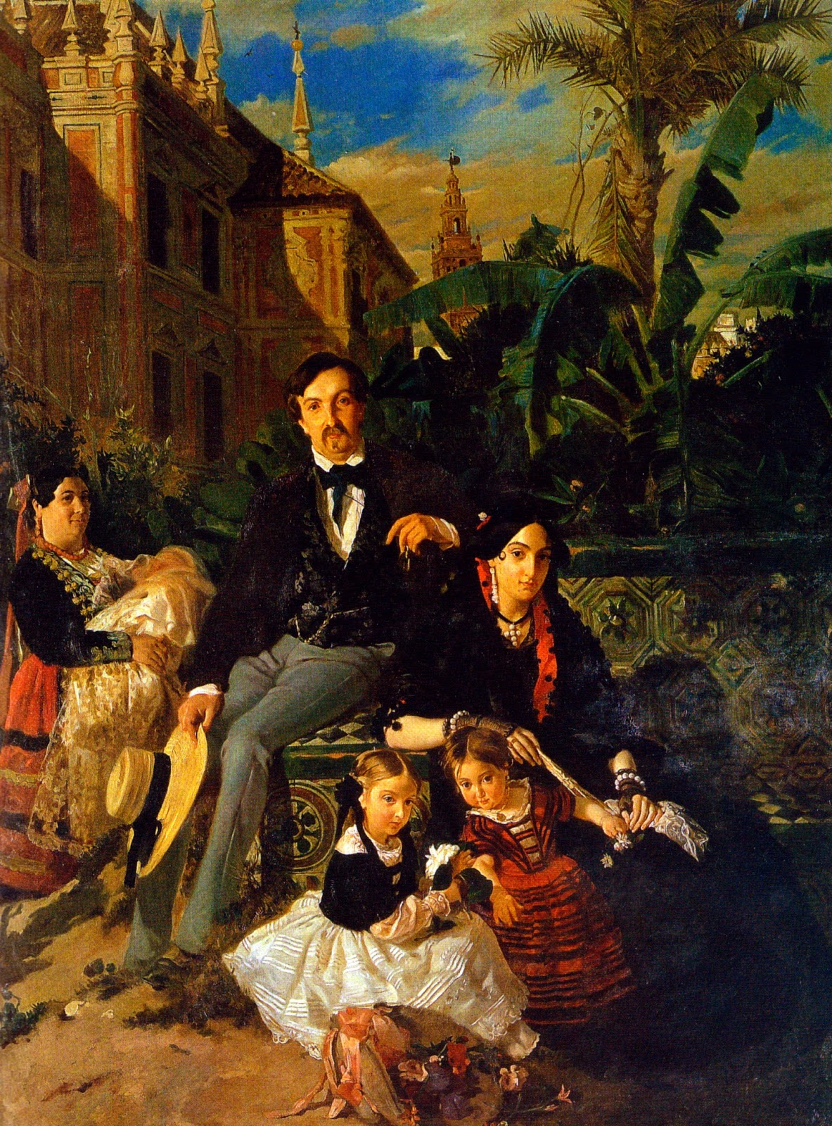 Los duques de montpensier y sus hijos en los jardines del Palacio de San Telmo en Sevilla